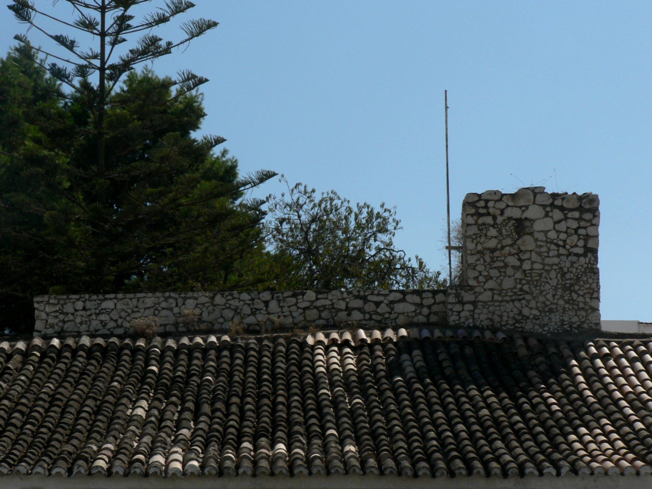 Ruínas do Castelo de Alvor